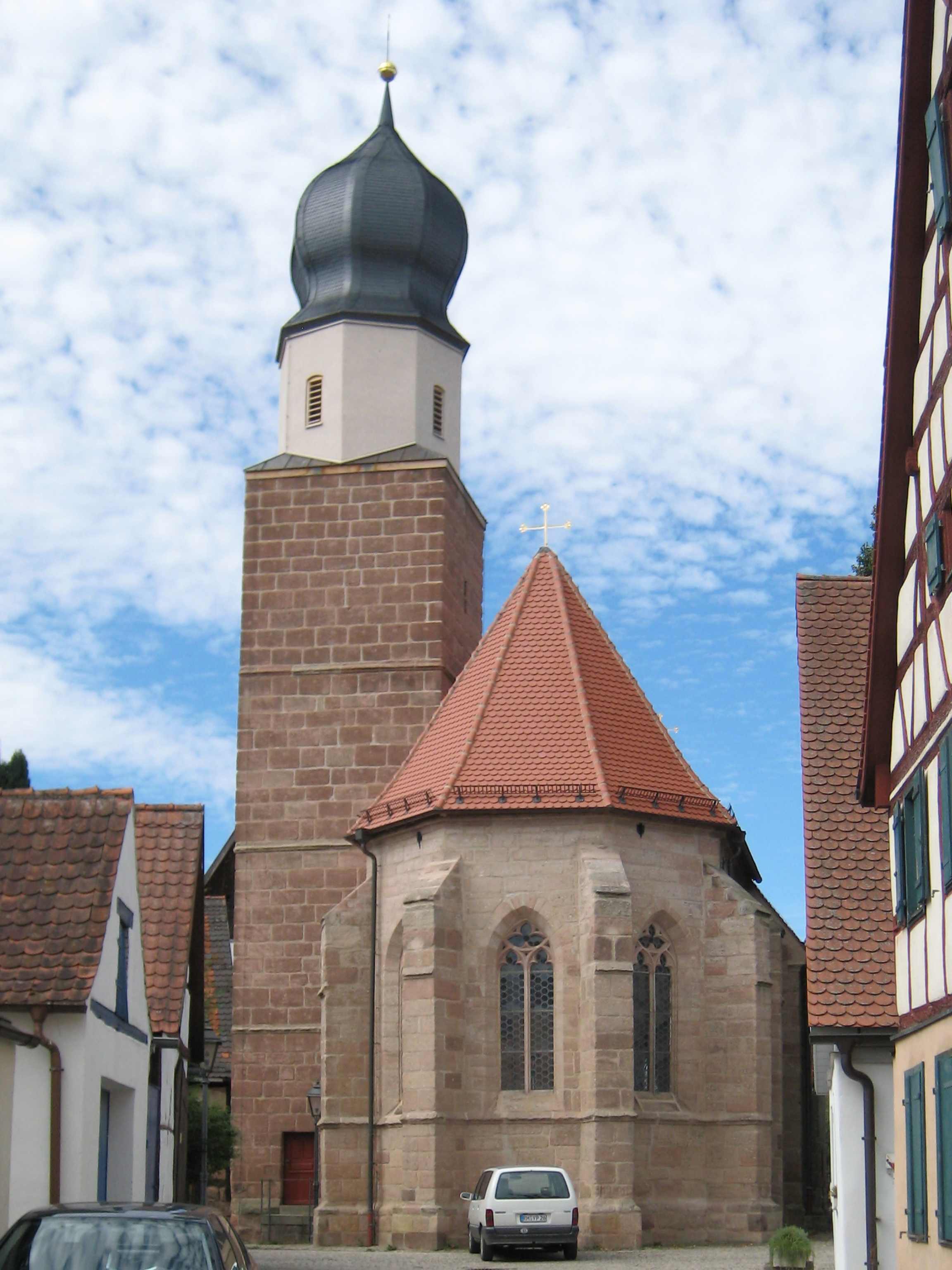 Sicht auf die Frauenkirche in Heideck